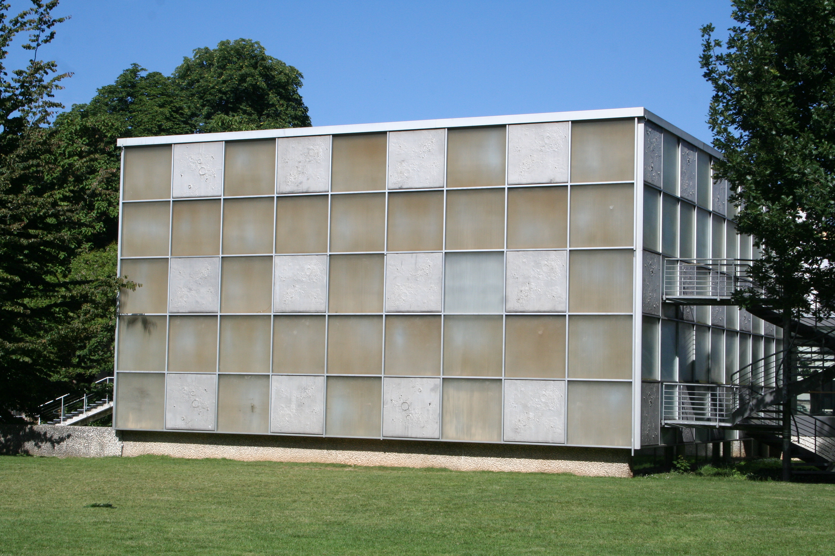 Schmuckmuseum Pforzheim